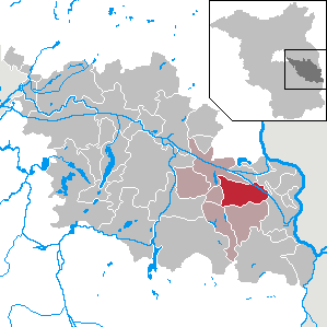 Siehdichum in Brandenburg (Country) - District Oder-Spree